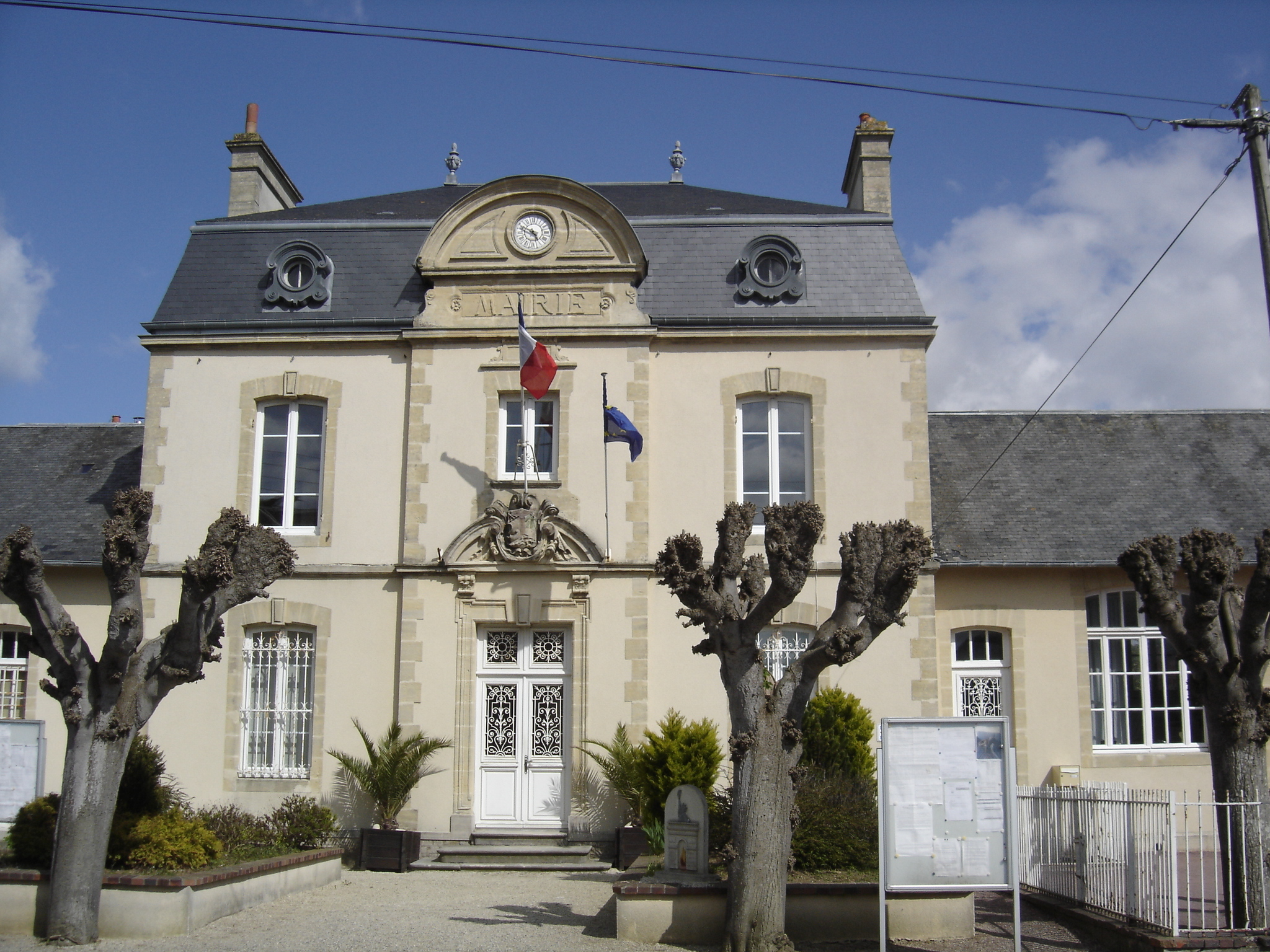 Autrefois mairie, école et bureau de poste ce bâtiment inauguré en 1894 est encore en 2012 mairie et école